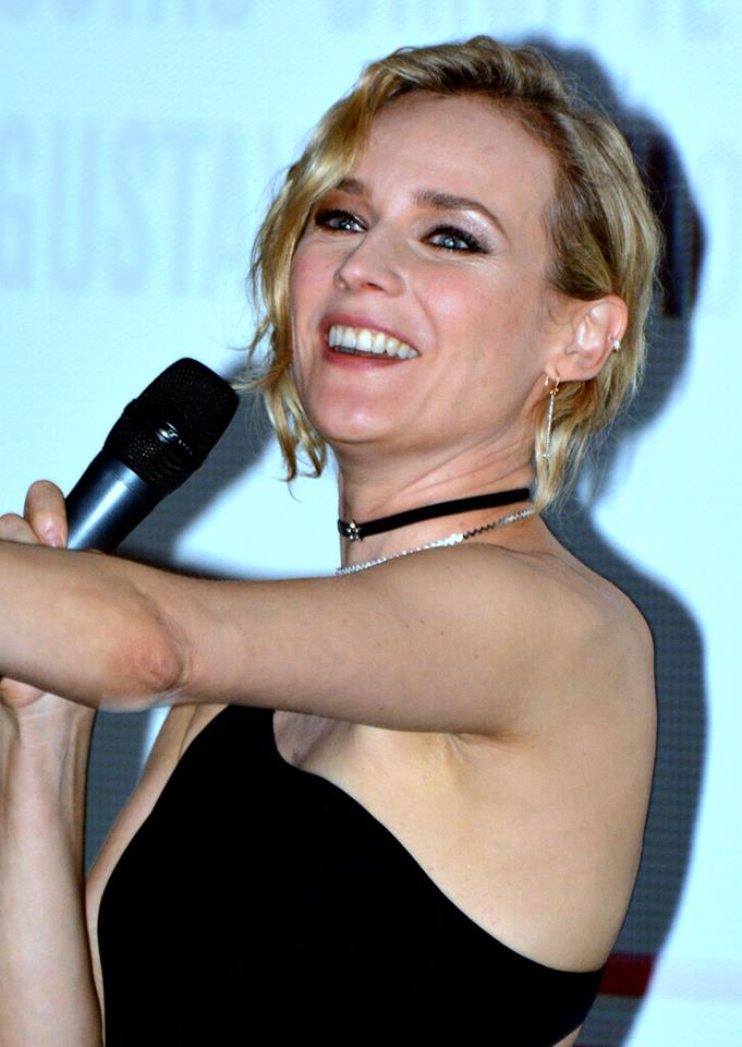 Diane Kruger à l'avant-première du film "Tout nous sépare"